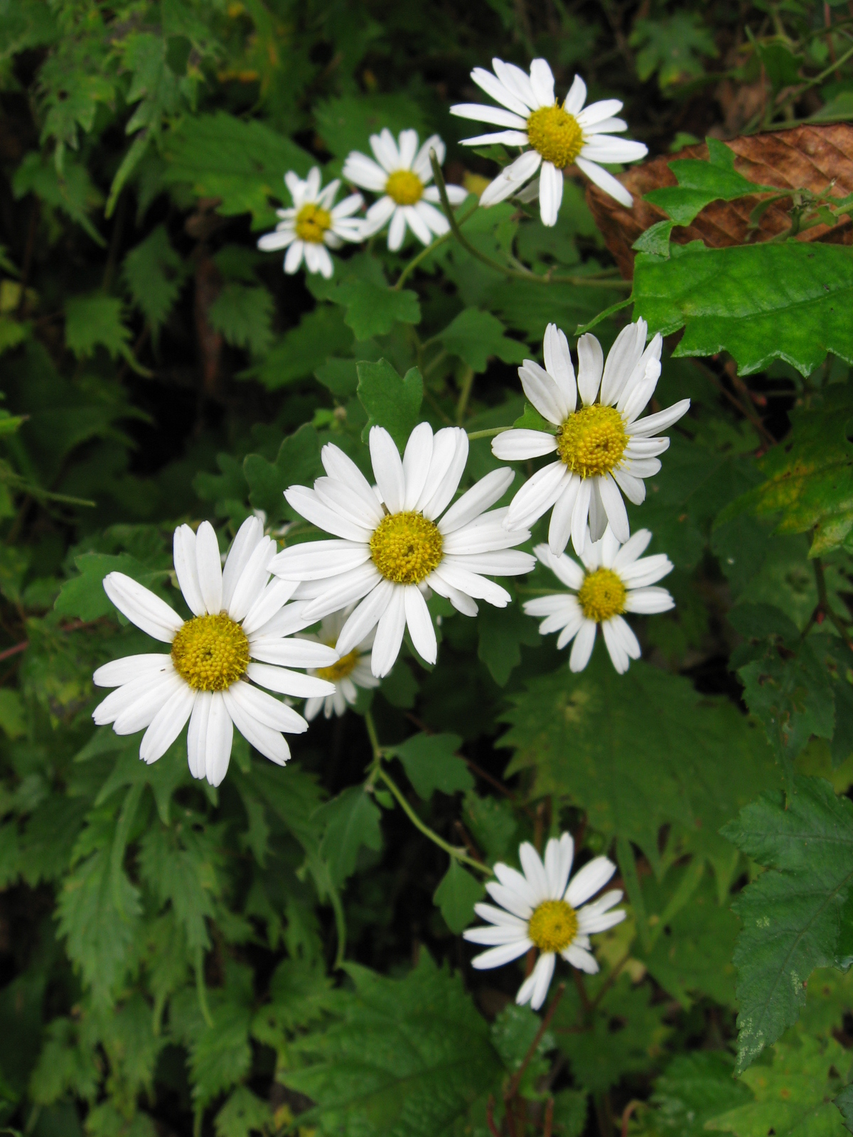 リュウノウギク (学名:Chrysanthemum japonicum)